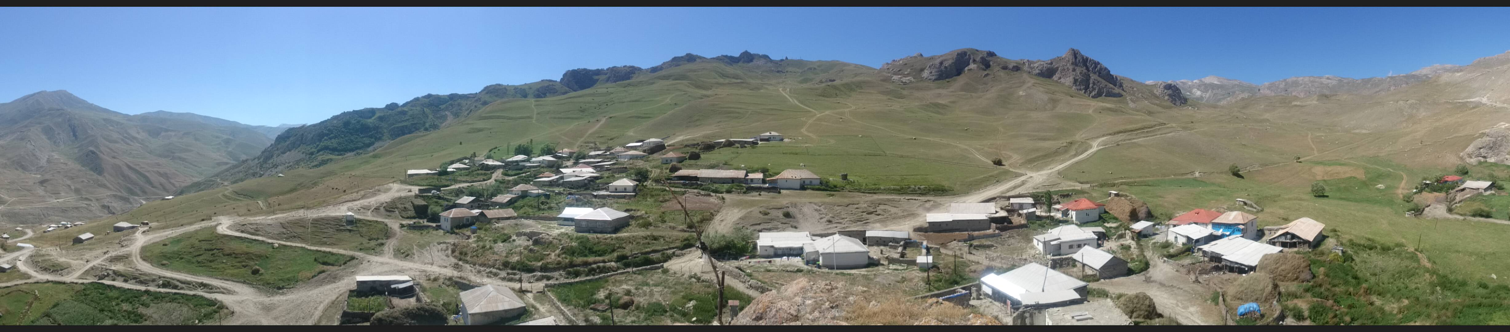 Cek kəndi